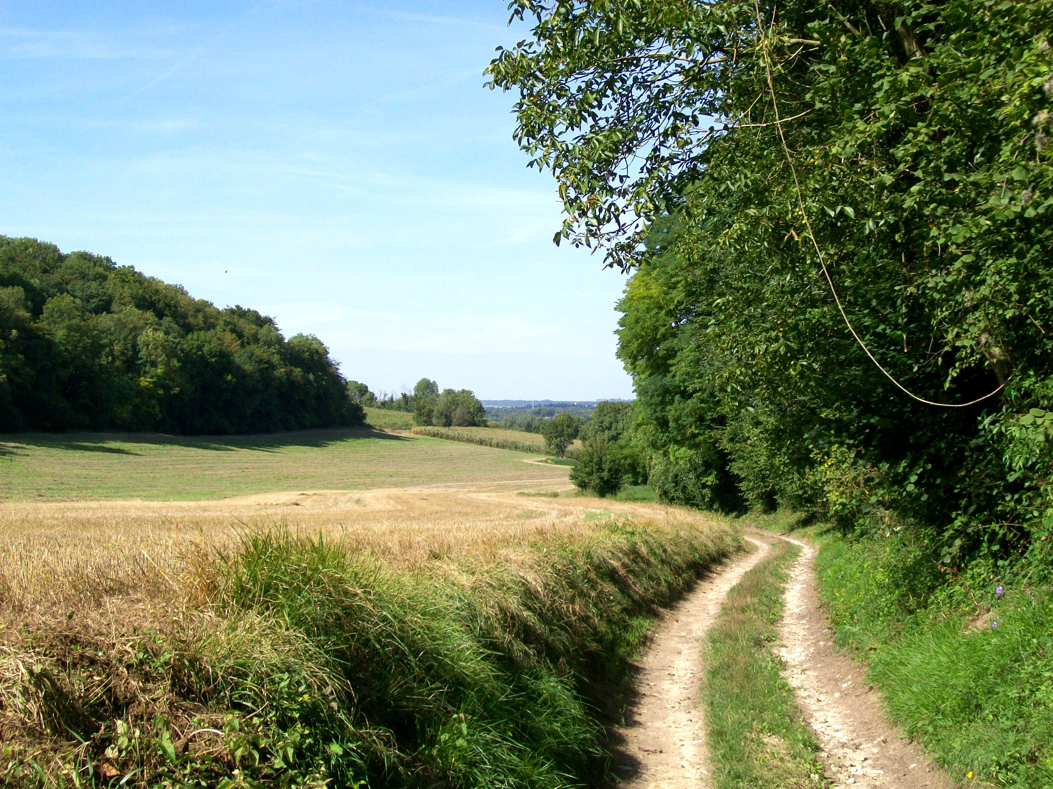 Le fond des Vaux, vallon du versant nord de la forêt d'Halatte, avec la route de l'Est.